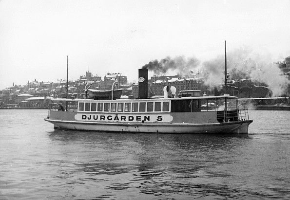 Djurgården 5